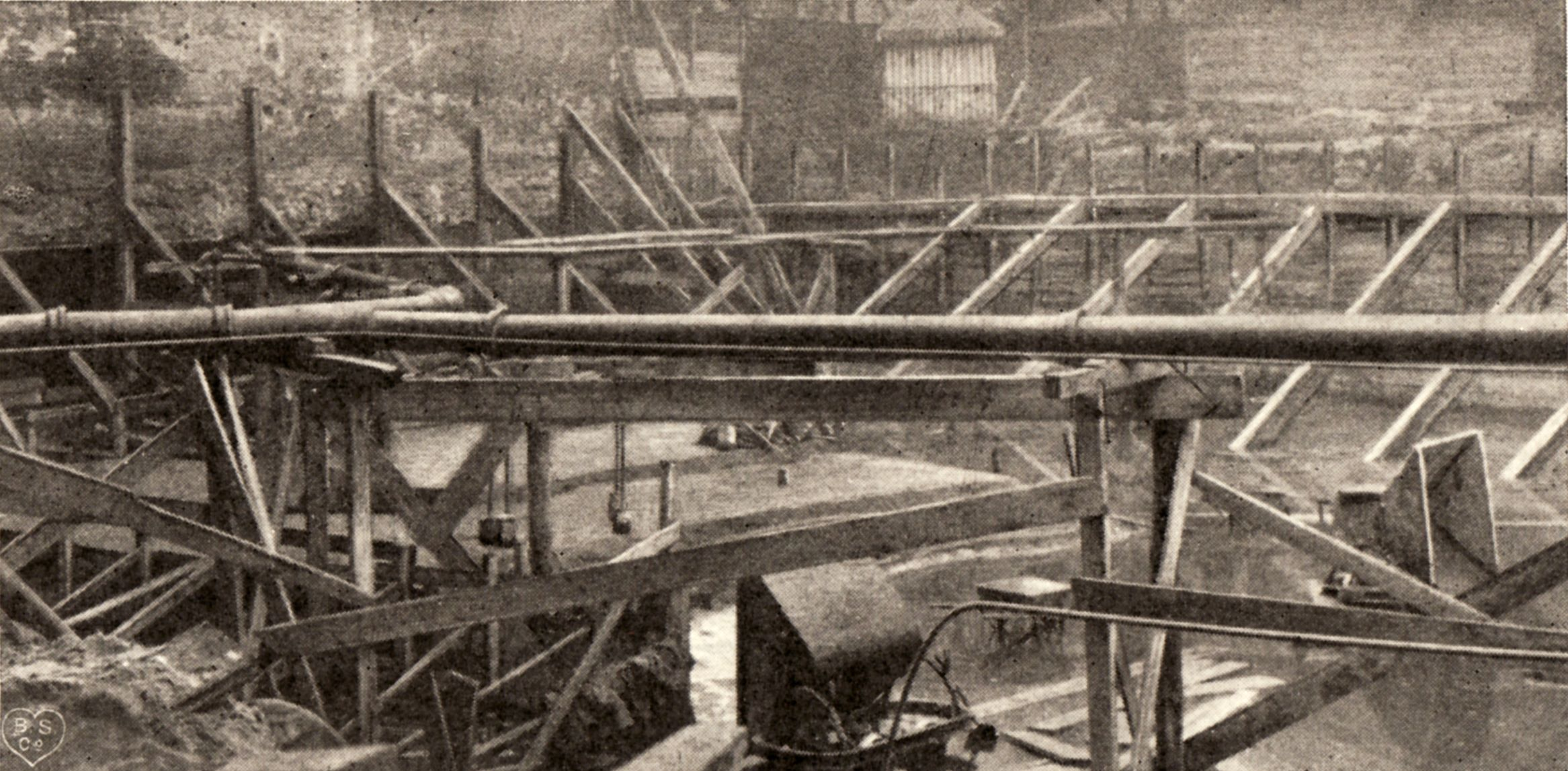 Berlin - Weinhaus Rheingold, Vorrichtungen zur Grundwasserabsenkung beim Bau